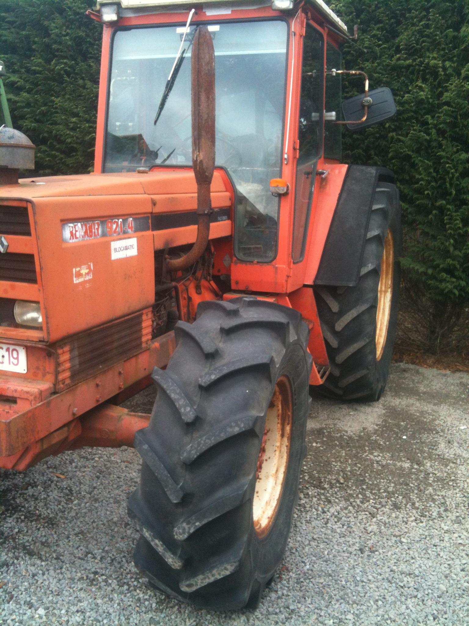 Renault Traktor 921-4